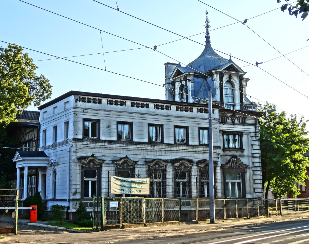 Willa fabrykanta, właściciela Fabryki Obrabiarek do Drewna Carla Blumwe - ul. Nakielska 53 w Bydgoszczy (1891)